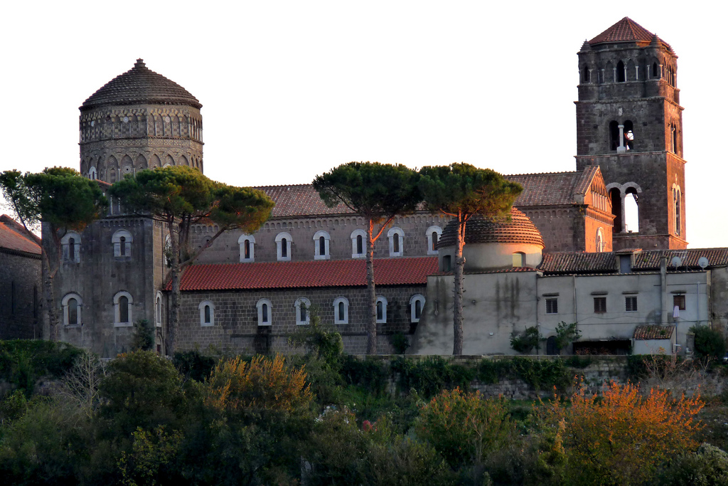 Cattedrale medievale (anno 1113) di S. Michele Arcangelo a Caserta Vecchia (o Casertavecchia) - CE - Italia